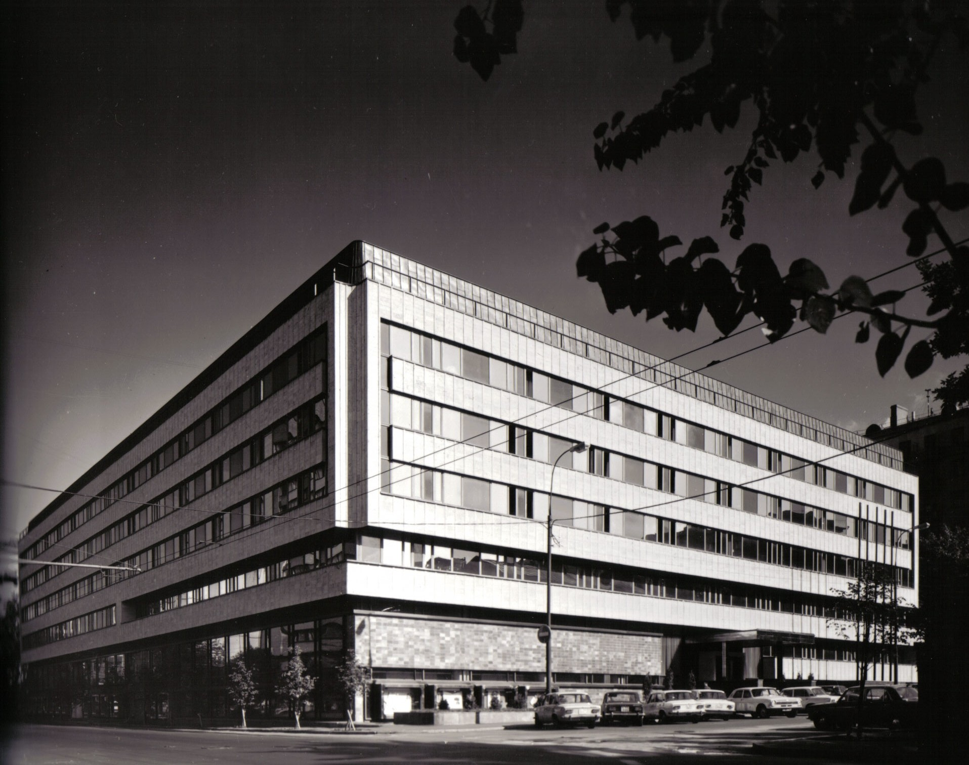 Obch. zastupiteľstvo v Moskve (1975)